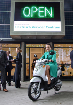 De Rotterdamse wethouder Alexandra van Huffelen (duurzaamheid, binnenstad en buitenruimte)op een elektrische scooter tijdens de opening van het Nieuwe Rijden I Elektrisch Vervoer Centrum.